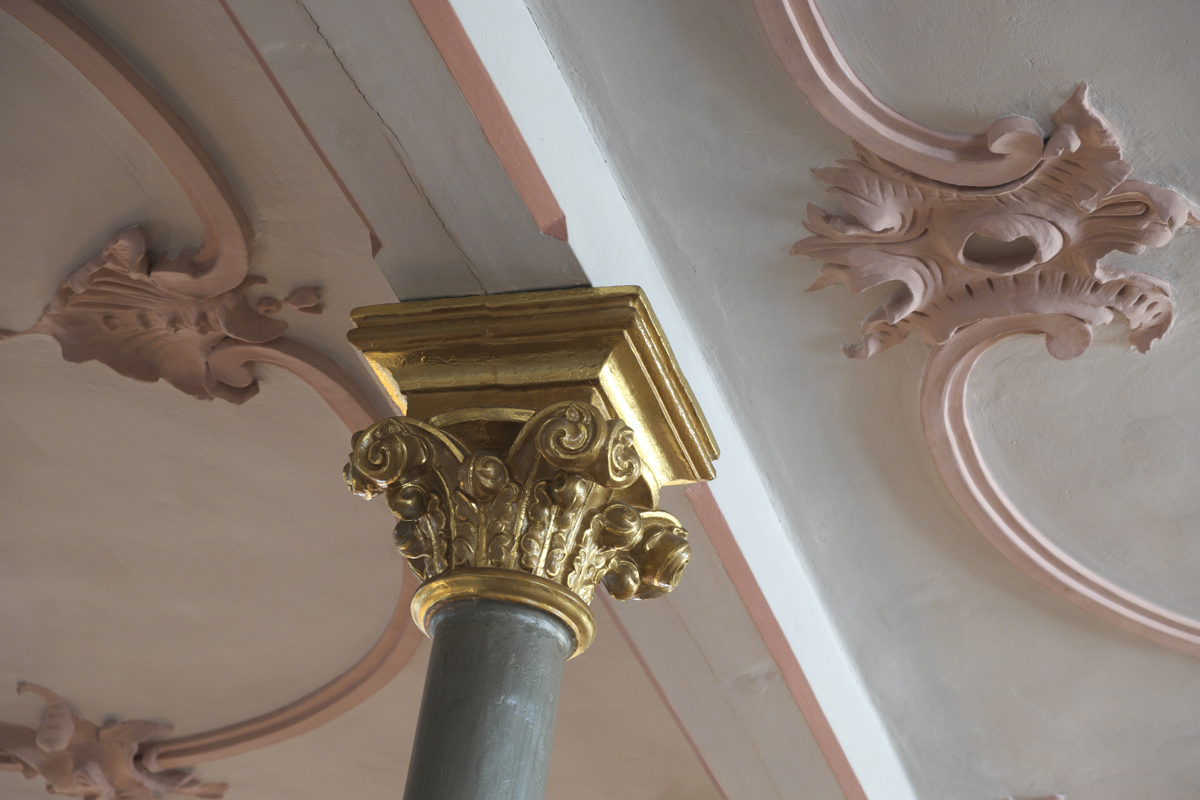 Katholische Pfarrkirche St. Laurentius in Petershausen im Landkreis Dachau (Bayern/Deutschland), Säule mit Kapitell unter der Empore